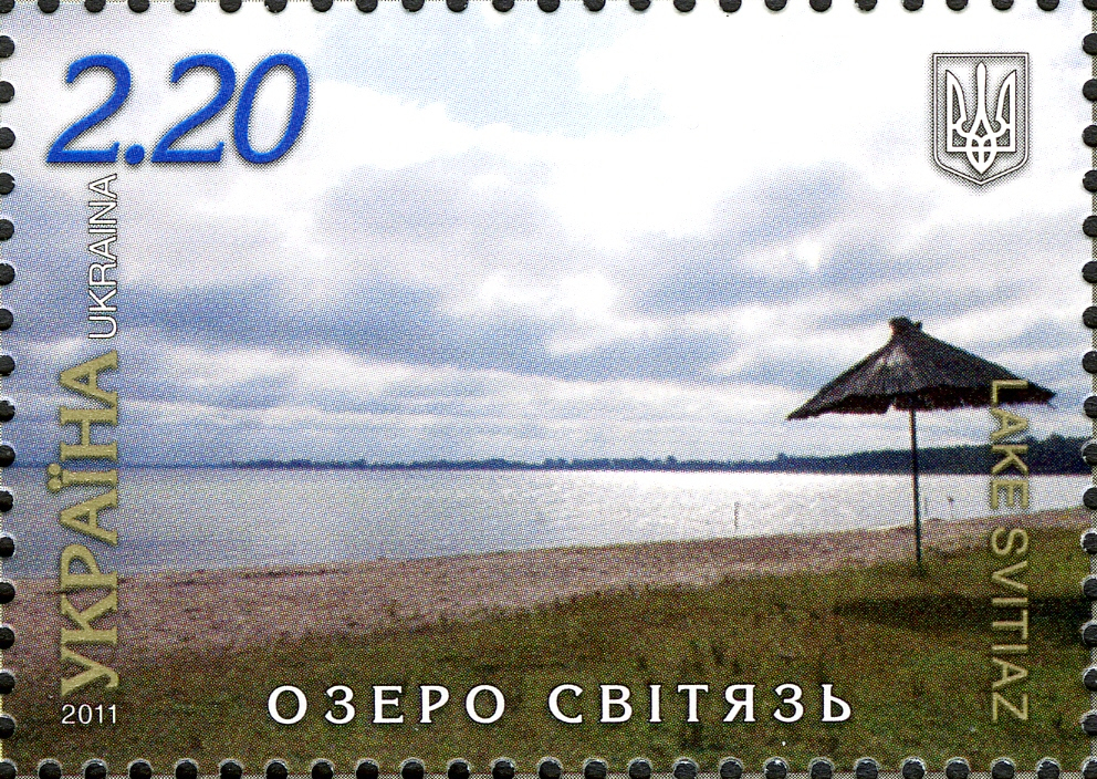 Озеро Світязь на марці, присвяченій проекту "Сім природніх чудес України"